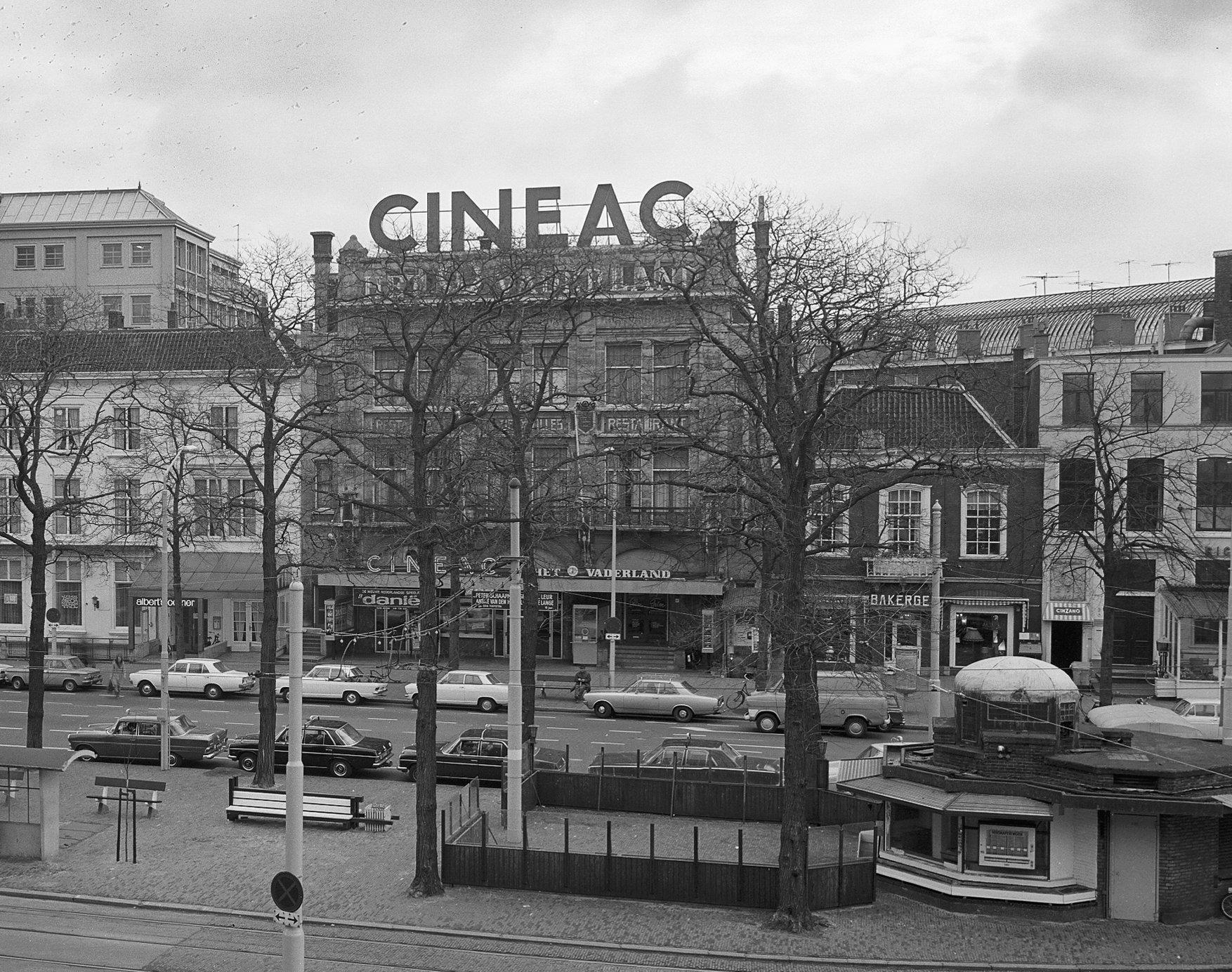 Buitenhof 19, overzicht, CINEAC